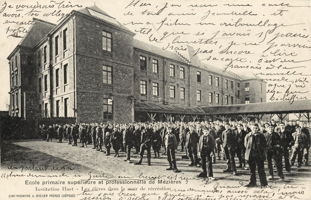 École Primaire supérieure et professionnelle de Mézières (Ardennes), cour de récréation, carte postale ancienne (non grevée de droits).